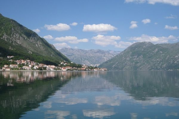 Вид на Прчань из Доброты (Черногория).